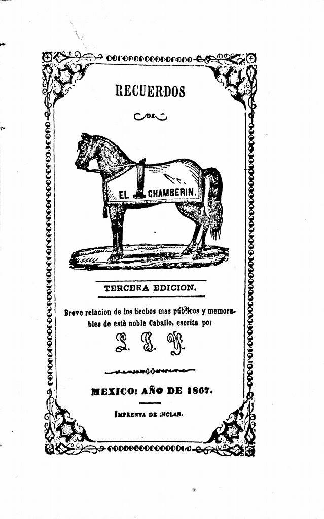 Portada de Recuerdos del Chamberín, copia facsimilar tomada de El libro de las charrerías.